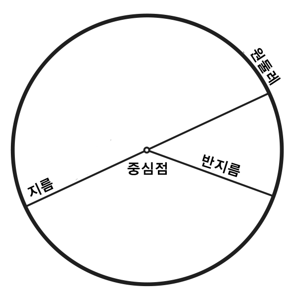 위키미디어 공용에서 가져와서 번역해서 올림